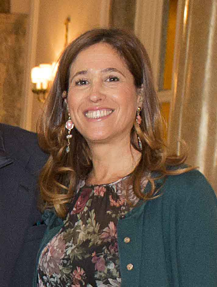 Desayuno Informativo Nueva Economía Forum